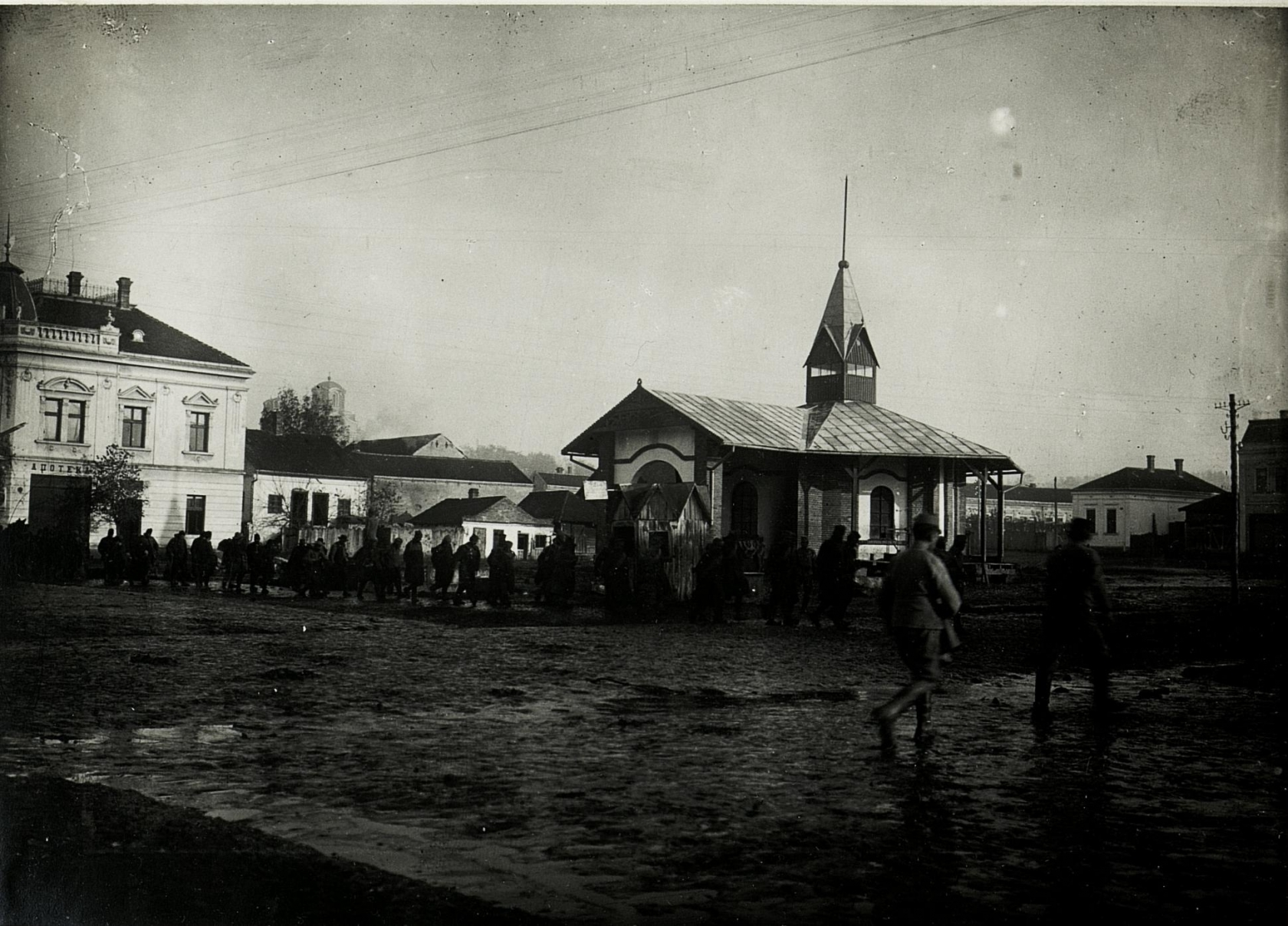 Mladenovac, Einbringung serbischer Gefangener.